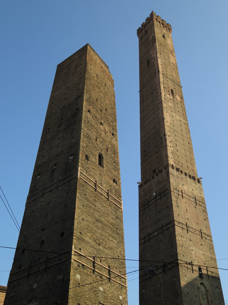 Torri Asinelli e Garisenda This is a photo of a monument which is part of cultural heritage of Italy.